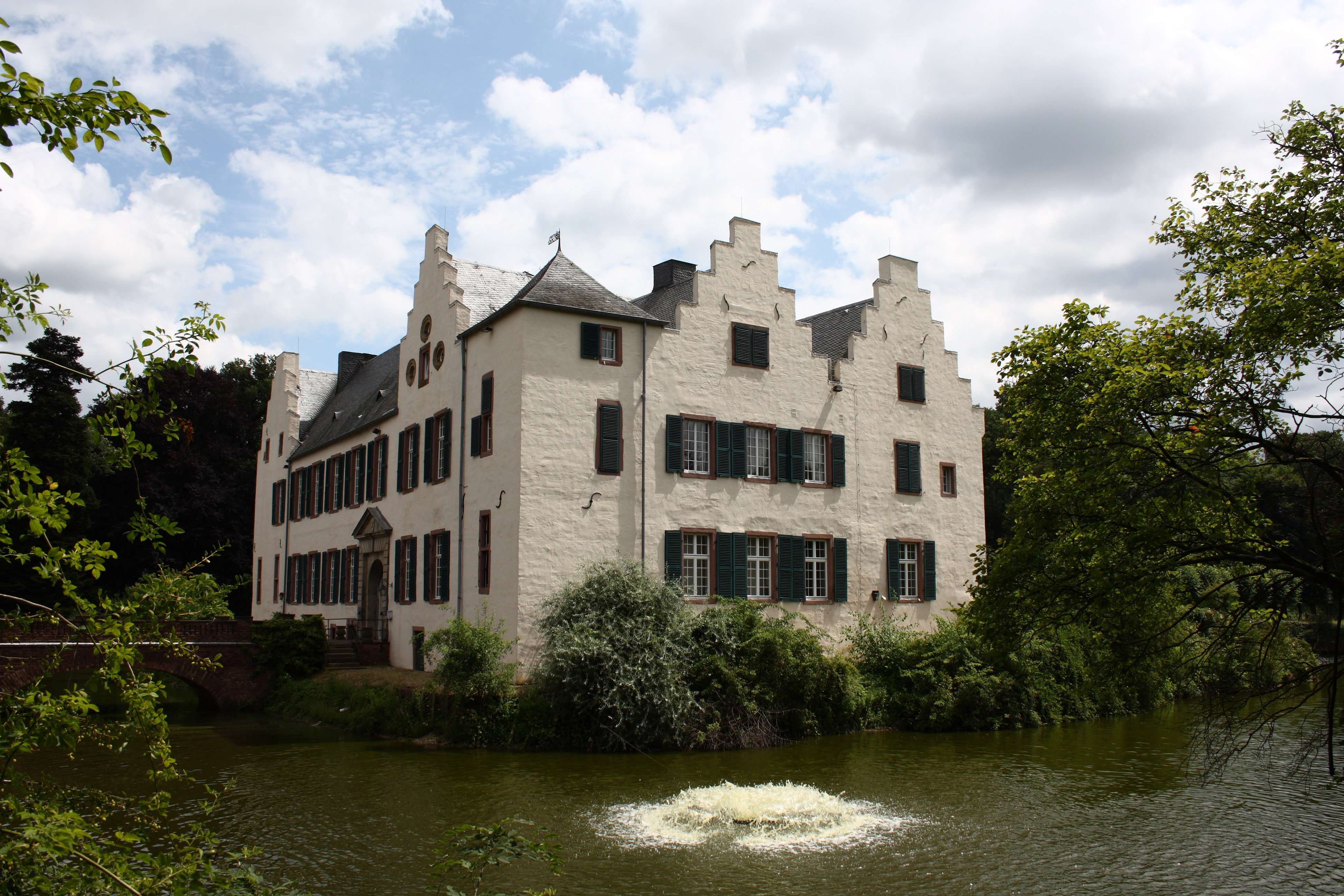 Burg Heimerzheim in Heimerzheim, einem Ortsteil von Swisttal im Rhein-Sieg-Kreis